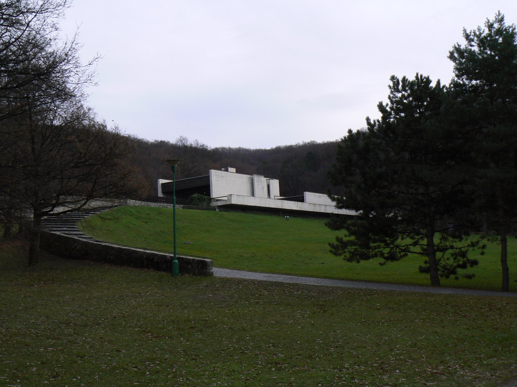 Krematórium a Urnový háj v Bratislave, pohľad na krematórium